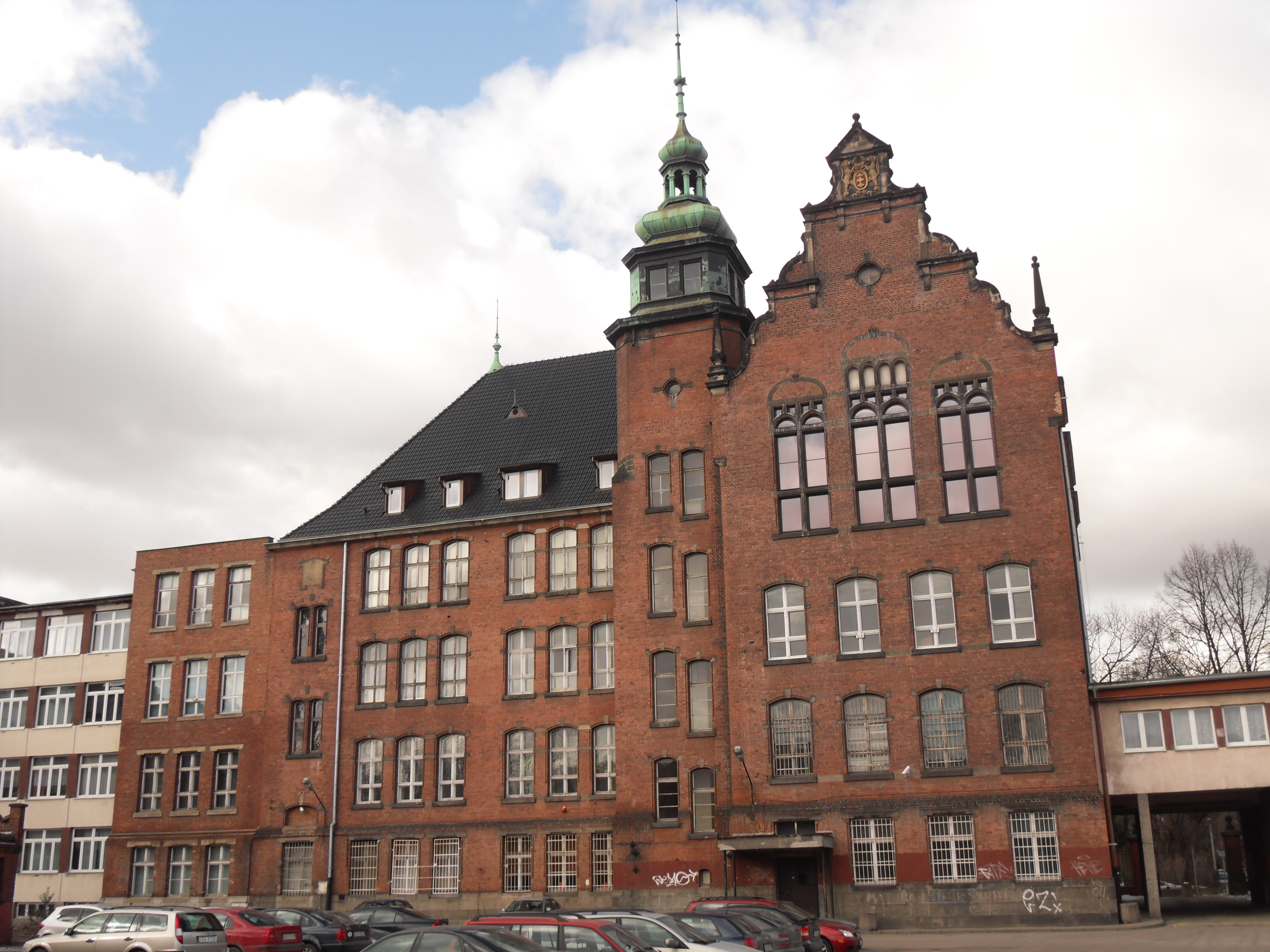 Gdańsk Wrzeszcz, szkoła Conradinum - zabytkowa część gmachu, zbudowana w latach 1898-1900.